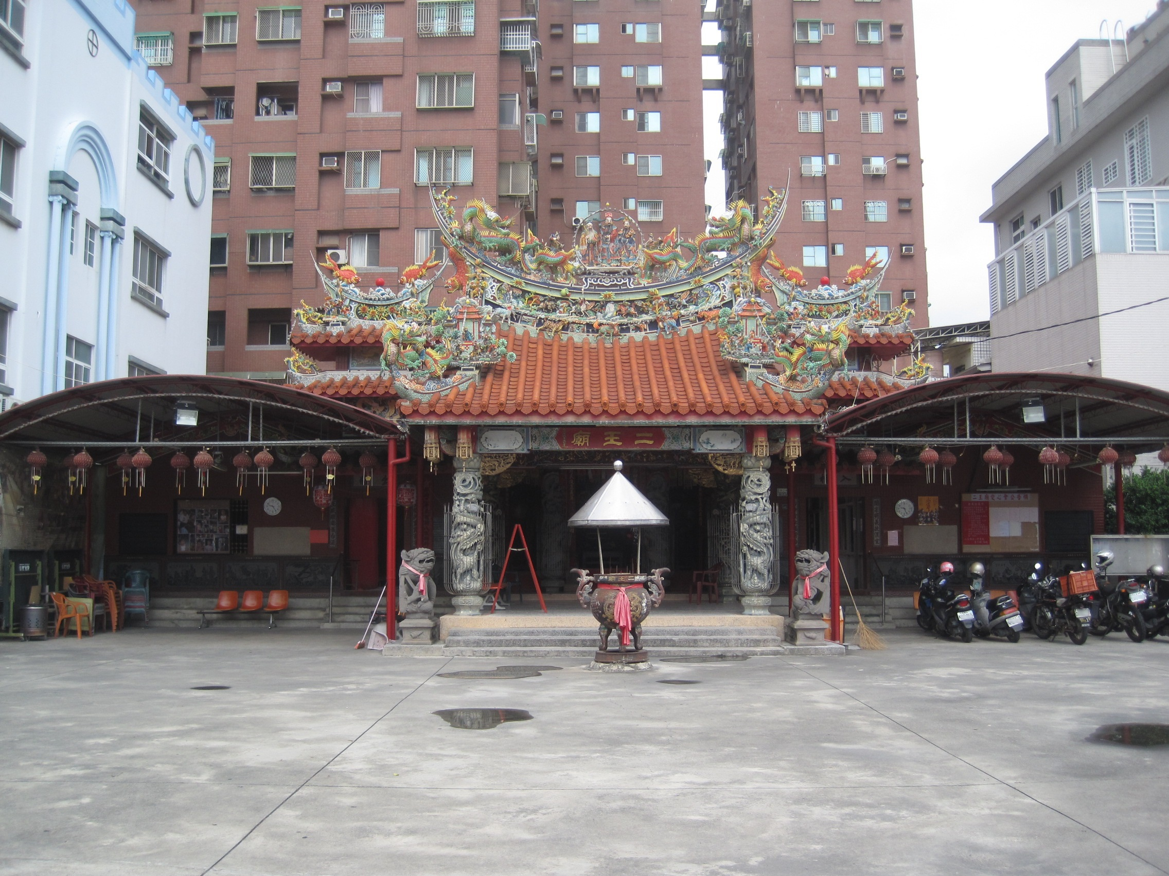 永康二王廟